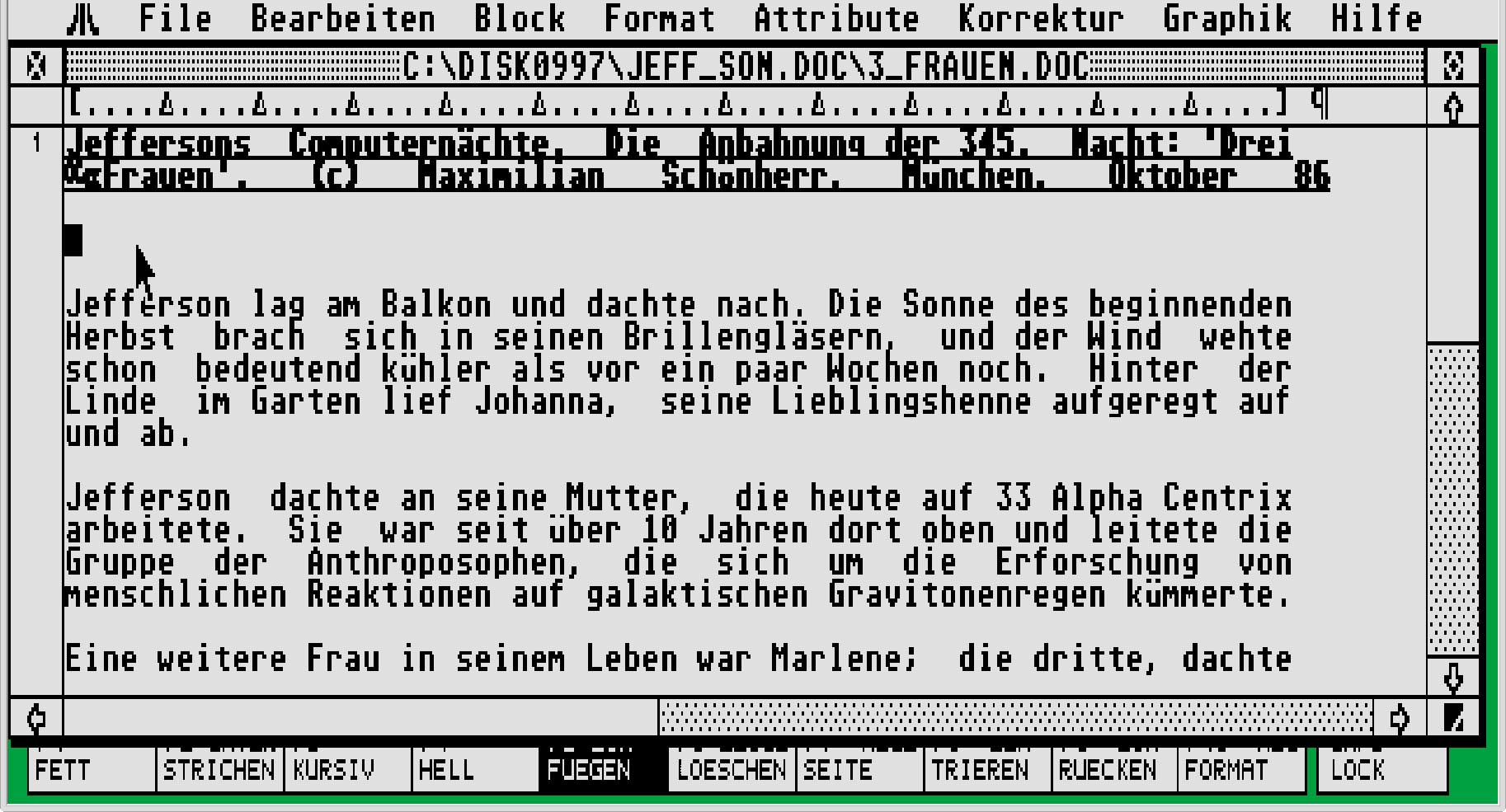 Screenshot des Textverarbeitungsbildschirms eines Atari ST Computers, darin zu sehen der Beginn des Texts einer Folge von "Jeffersons Computernächten". Jeffersons Computernächte war eine Kurzgeschichtenserie in "Bit, byte, gebissen – dem Computermagazin im Zündfunk", Bayerischer Rundfunk. Erfunden und geschrieben von Maximilian Schönherr.